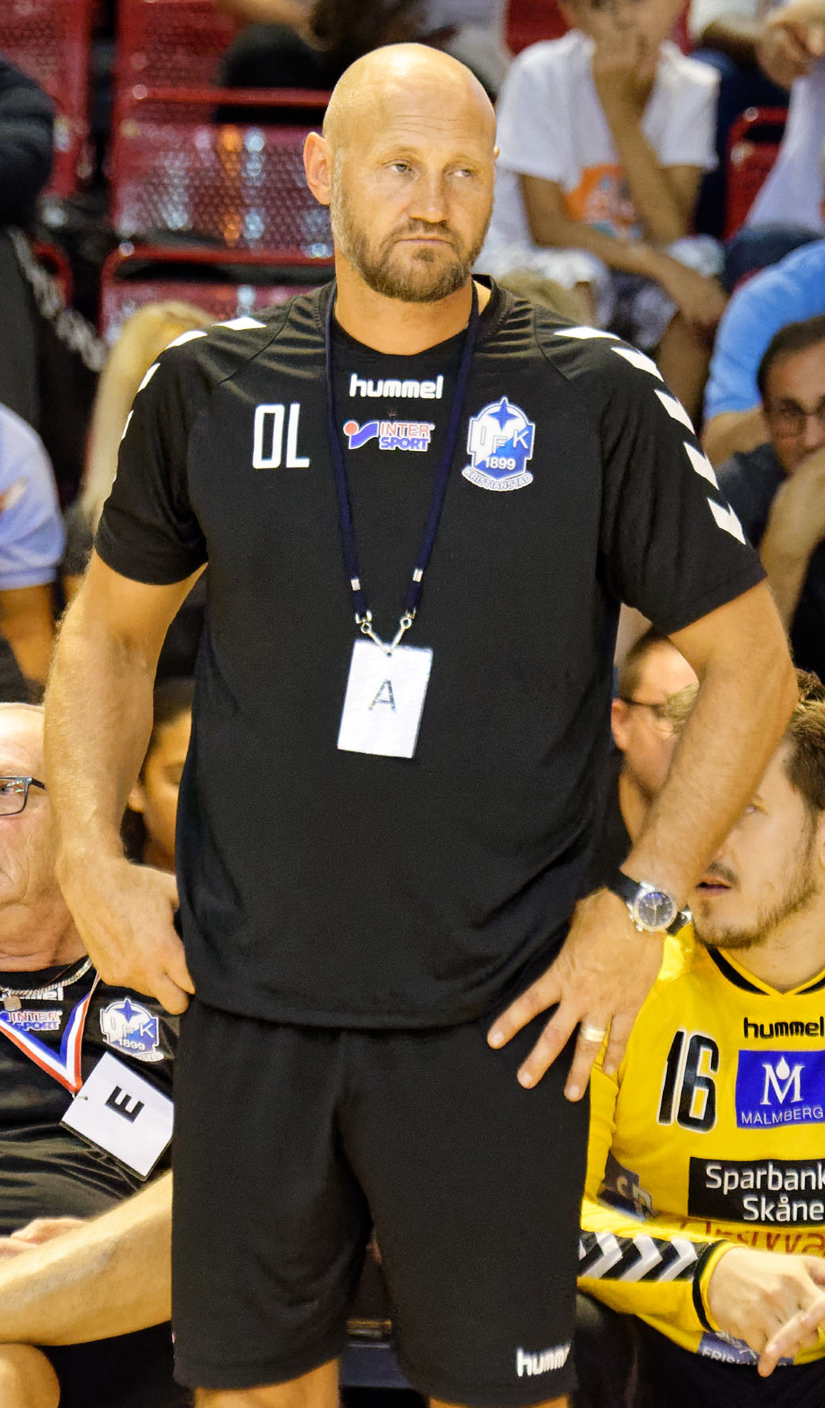 Rencontre du challenge Marrane 2016 entre l'US Ivry et les danois de IFK Kristianstad. A la Halle Carpentier (Paris 13e), le 04 septembre 2016.